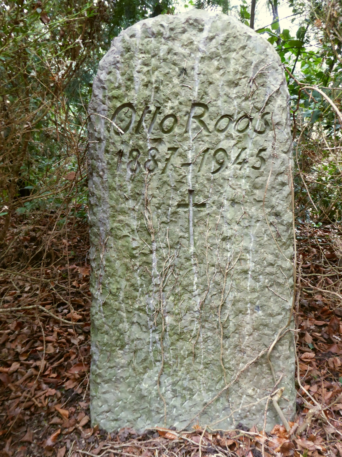 Otto Roos (1887–1945) Bildhauer, Maler. Grab auf dem Friedhof am Hörnli